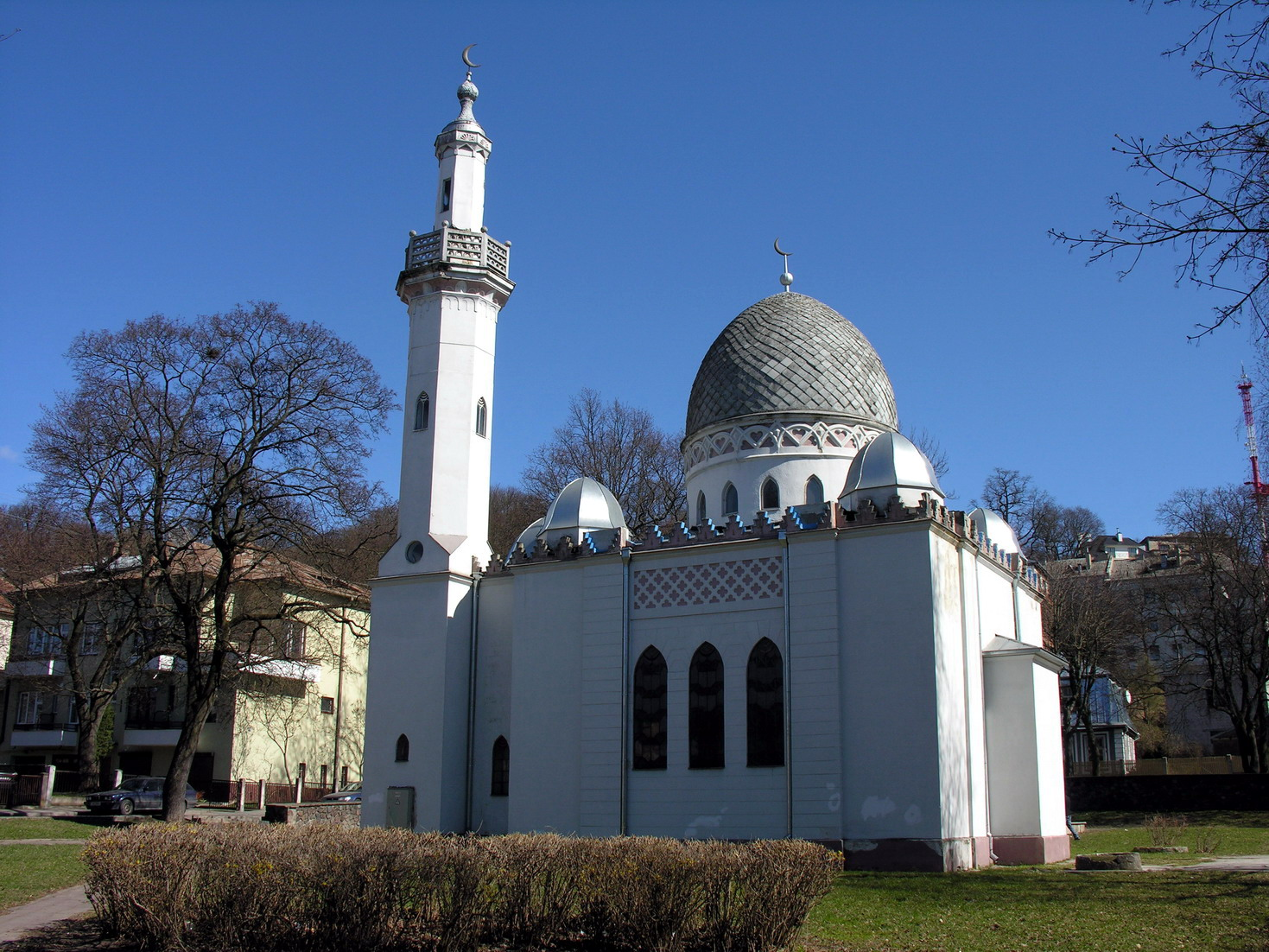 Kauno mečetė